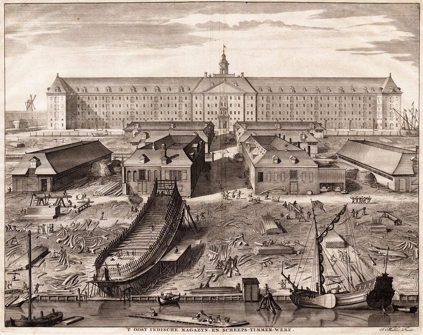 Het scheepswerfterrein van de VOC op Oostenburg in Amsterdam. Prent van de VOC-werf uit 1750, met op de voorgrond de IJ-oever met twee scheepshellingen. Het originele bestand staat hier en wordt hier gebruikt.